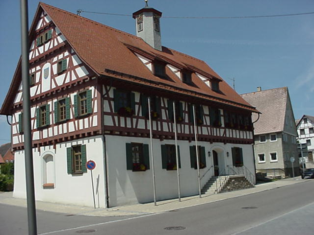 Laichingen, historická budova mezi náměstím a kostelem